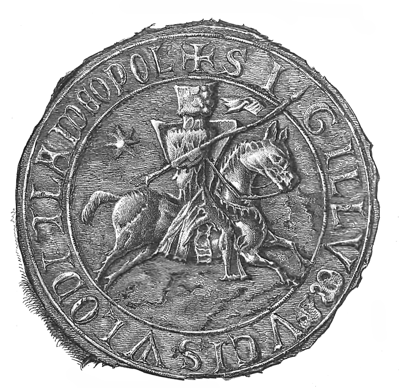 Władysław Opolski seal